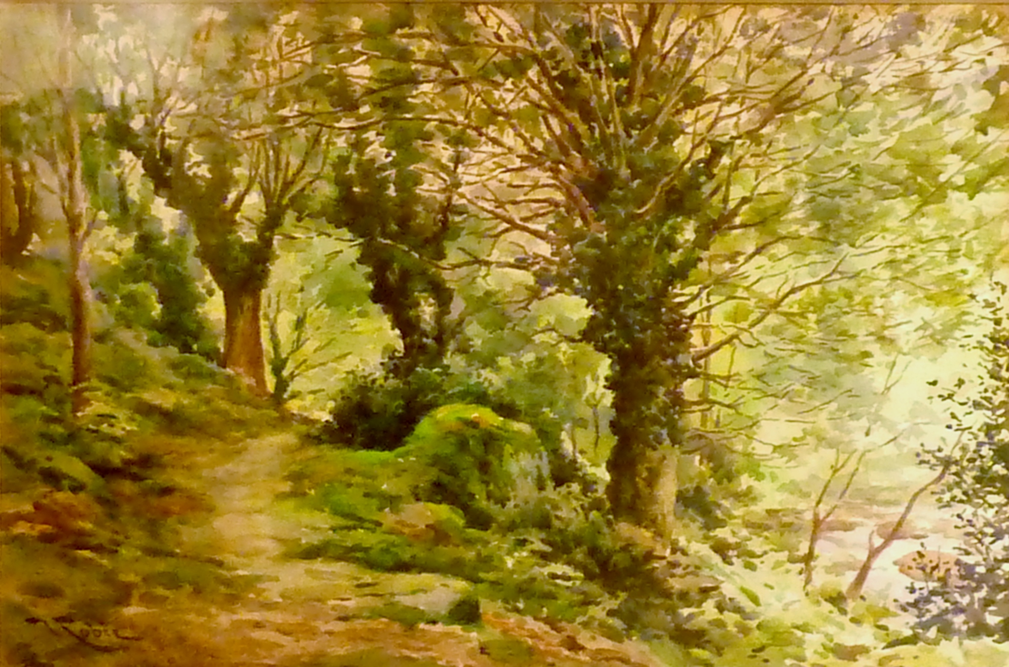 Victor Robic (1875-1941) : Les Roches du diable (aquarelle, collection particulière)